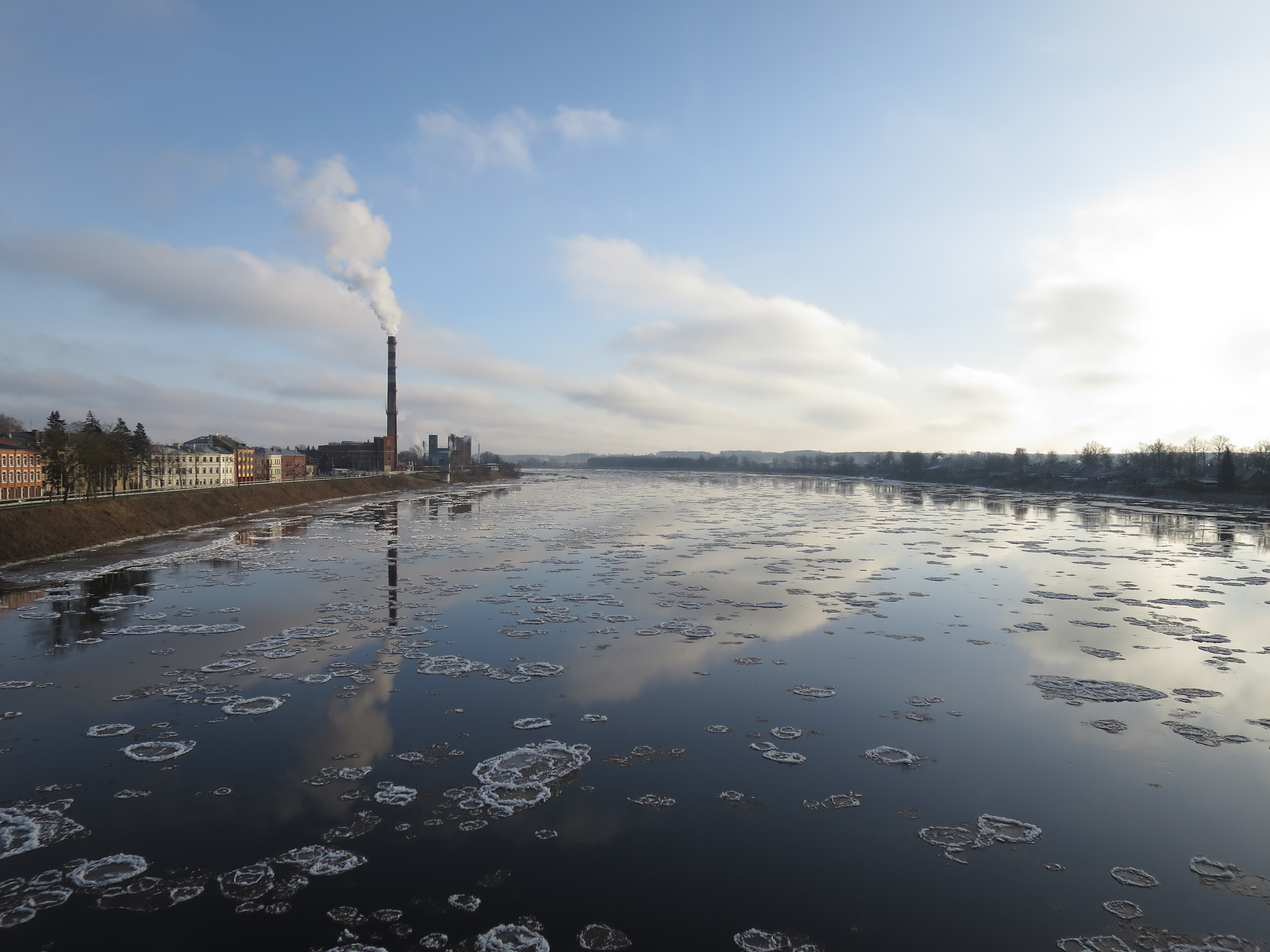 Vižņu iešana Daugavā. Skats no Vienības tilta Daugavpilī.